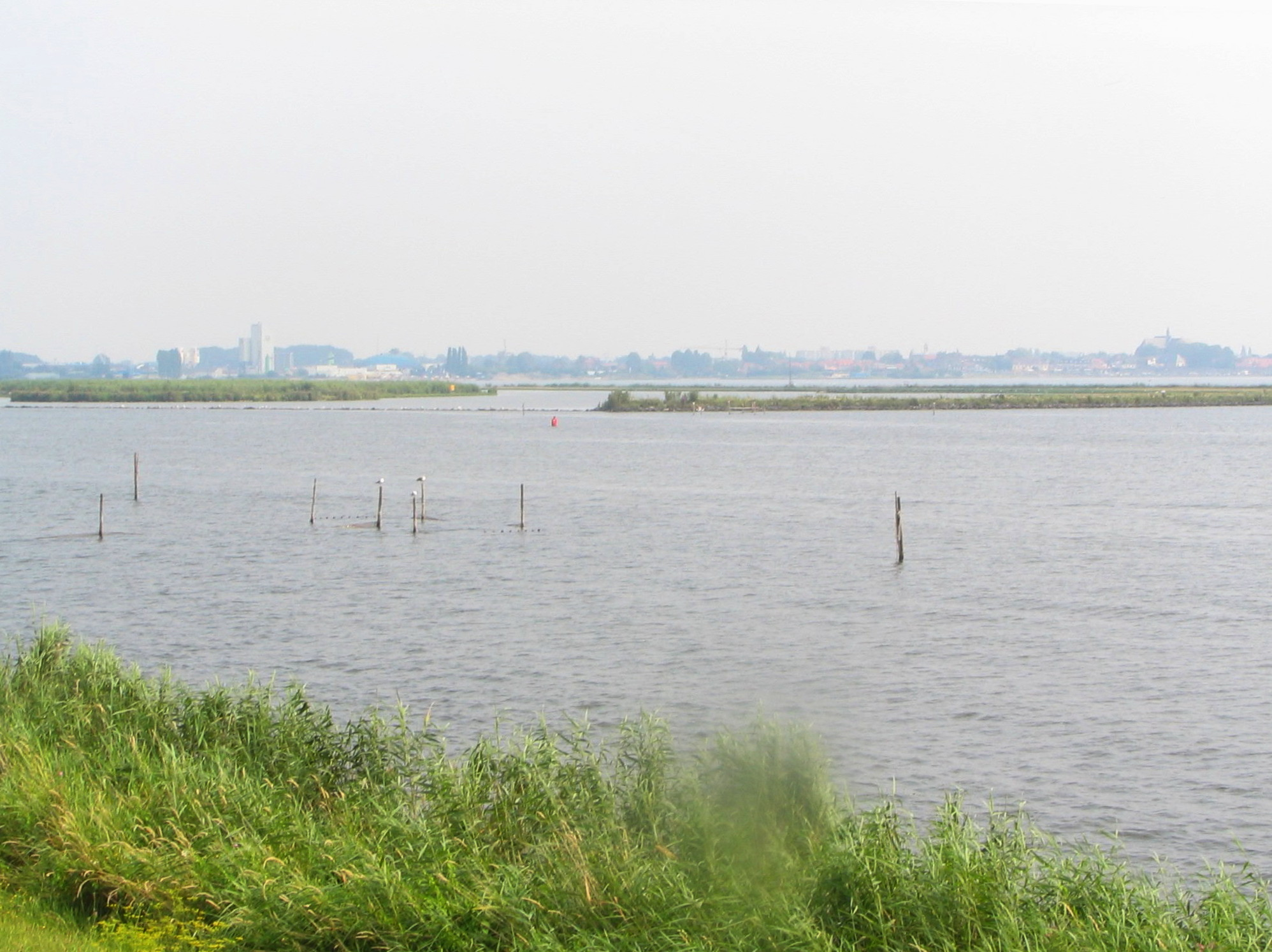 Wolderwijd, foto op een hete dag.